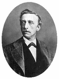 Beschreibung: Portrait von Eduard Douwes Dekker Copyright Status: Public Domain 18:39, 8. Mär 2004 John Doe 200 x 288 (14276 Byte)